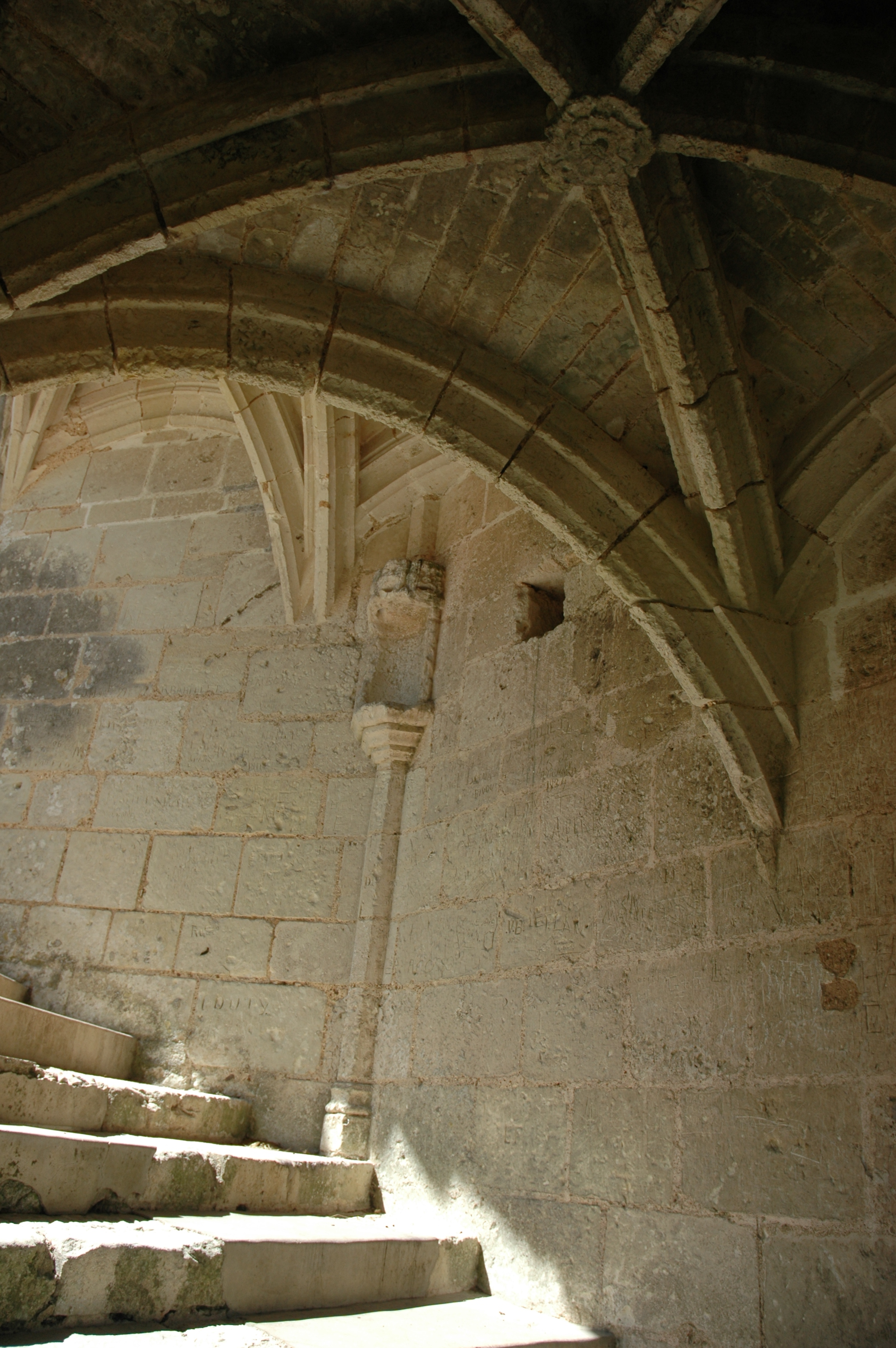 France, Loir-et-Cher Lavardin Le château (escalier)